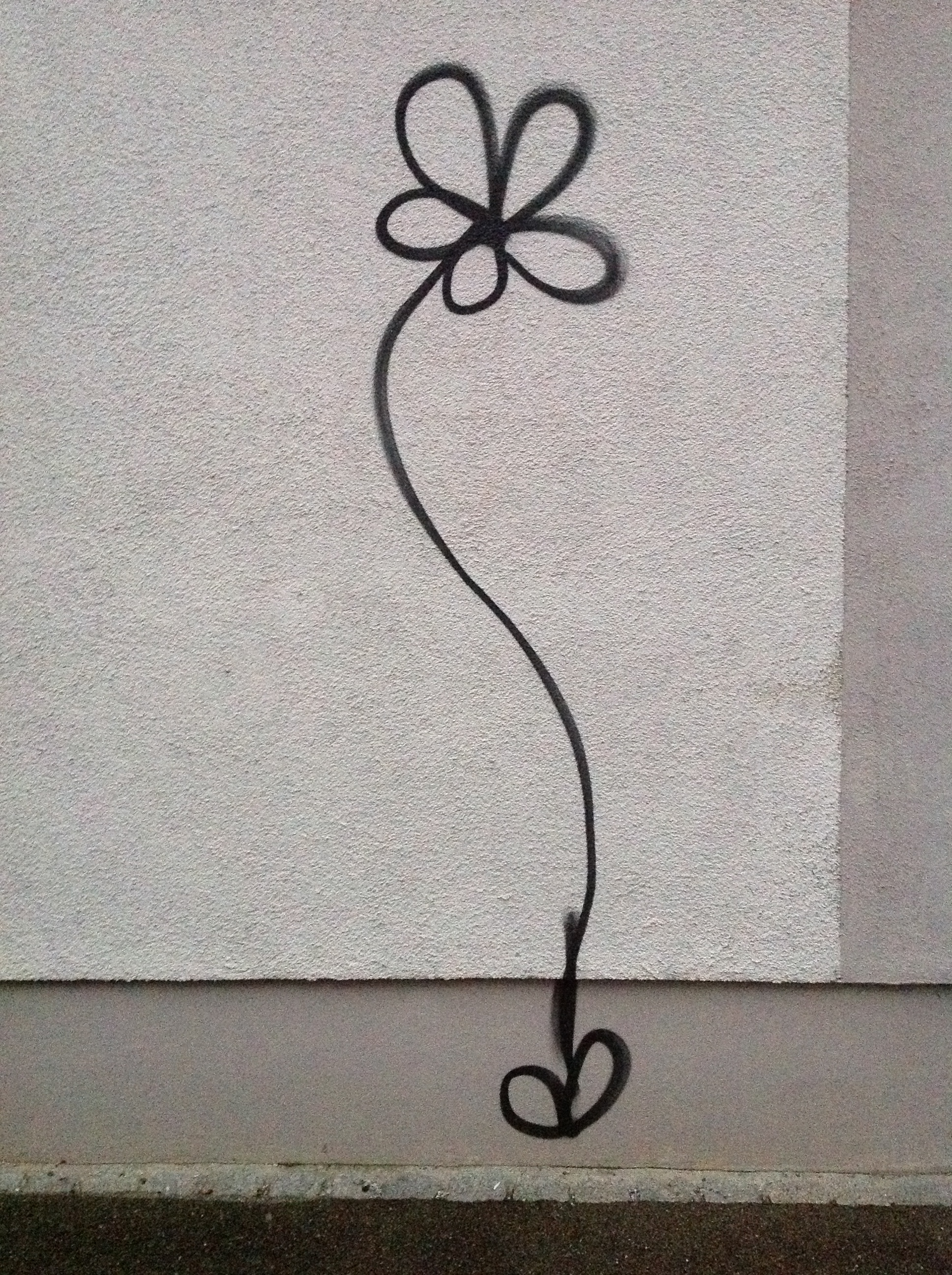 Die "Augsburg-Blume", ein in der Stadt Augsburg immer wiederkehrendes Graffito mit Kultcharakter.